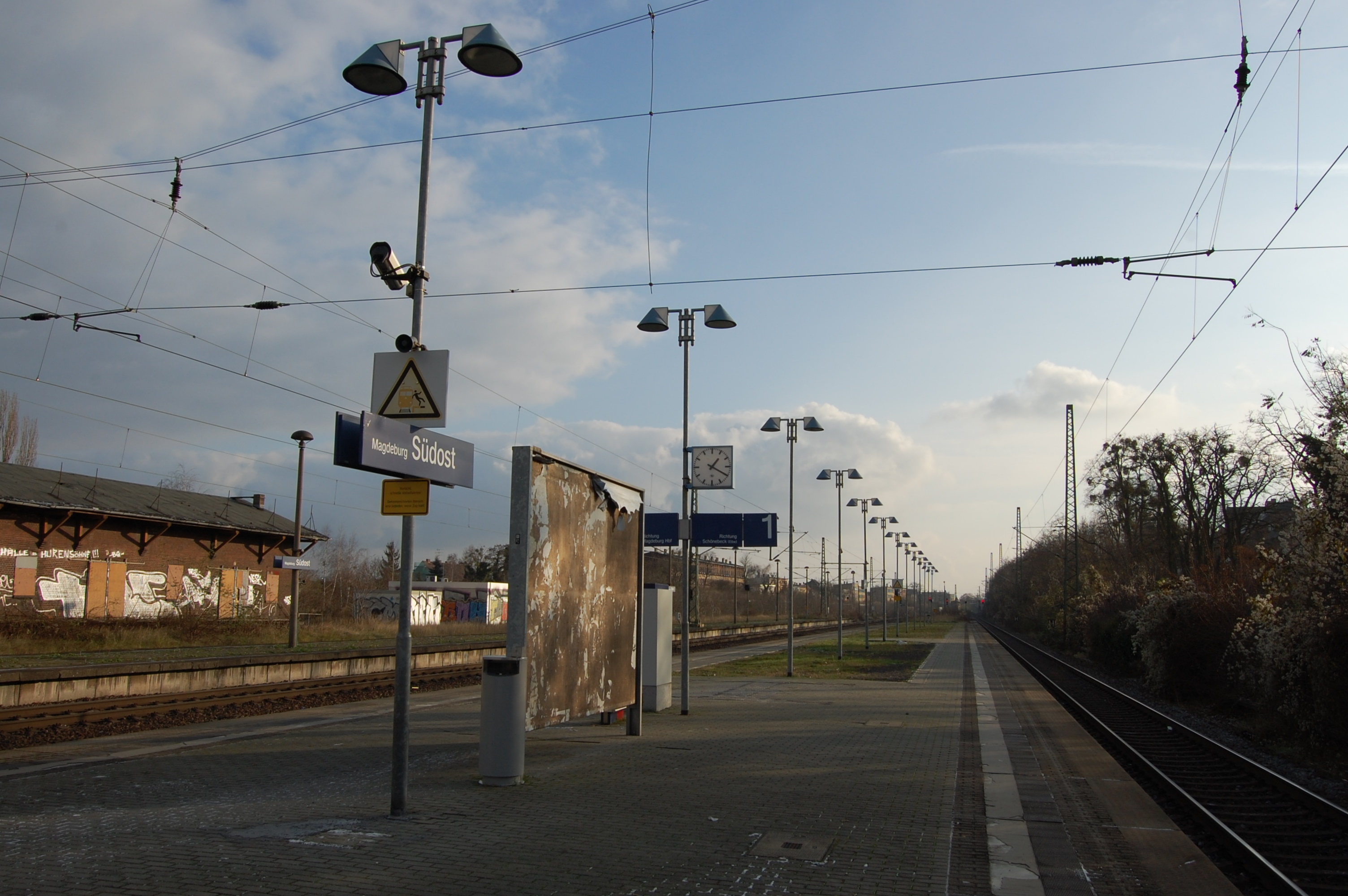 Bahnsteige des Bahnhofs Magdeburg Südost